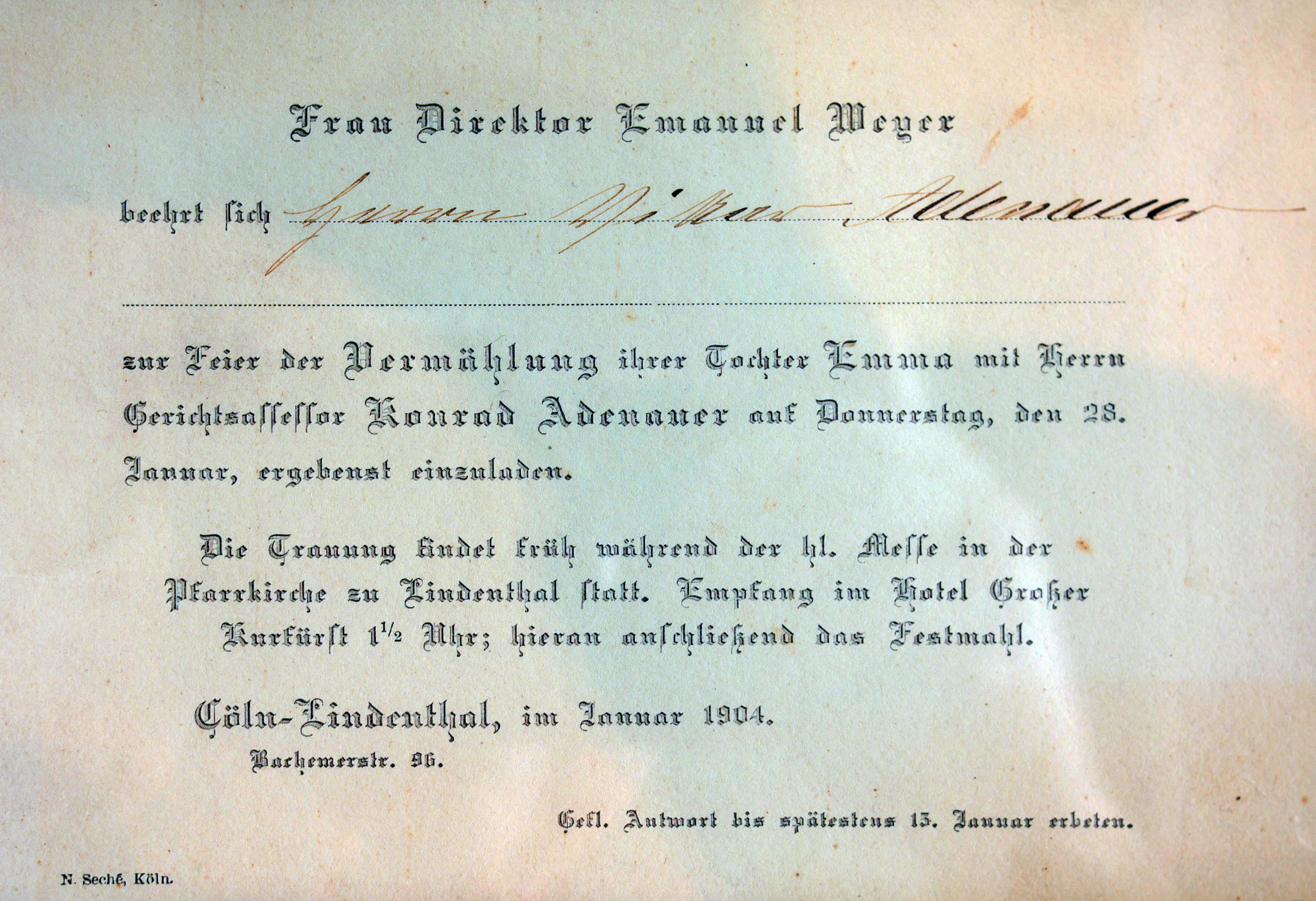 Einladungskarte zur Vermählung von Emma Weyer und Konrad Adenauer 1904